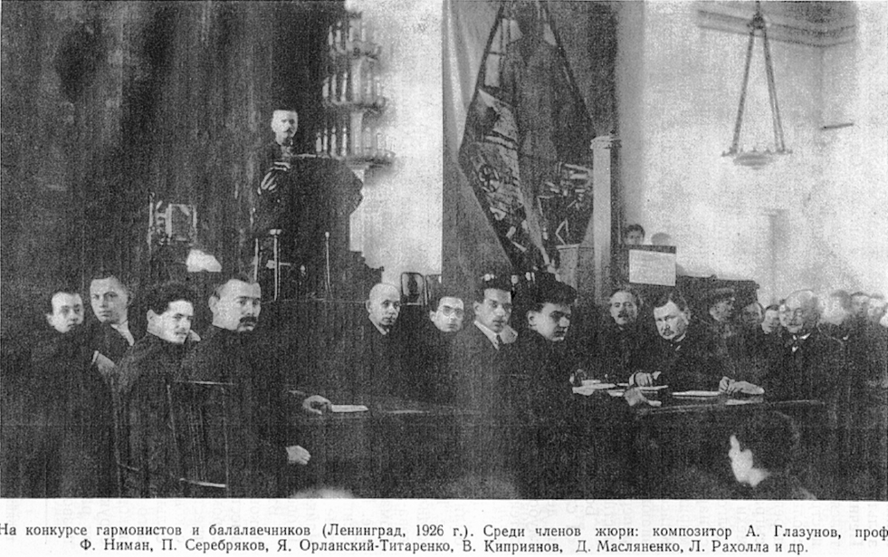 Жюри конкурса баянистов и балалаечников в Ленинграде, А. К. Глазунов и др.